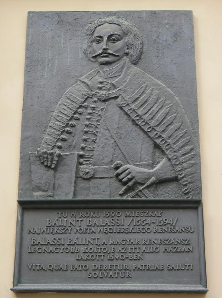 Tafel für den Dichter Bálint Balassa (1554-1594) am Pałac Pod Baranami in Krakau